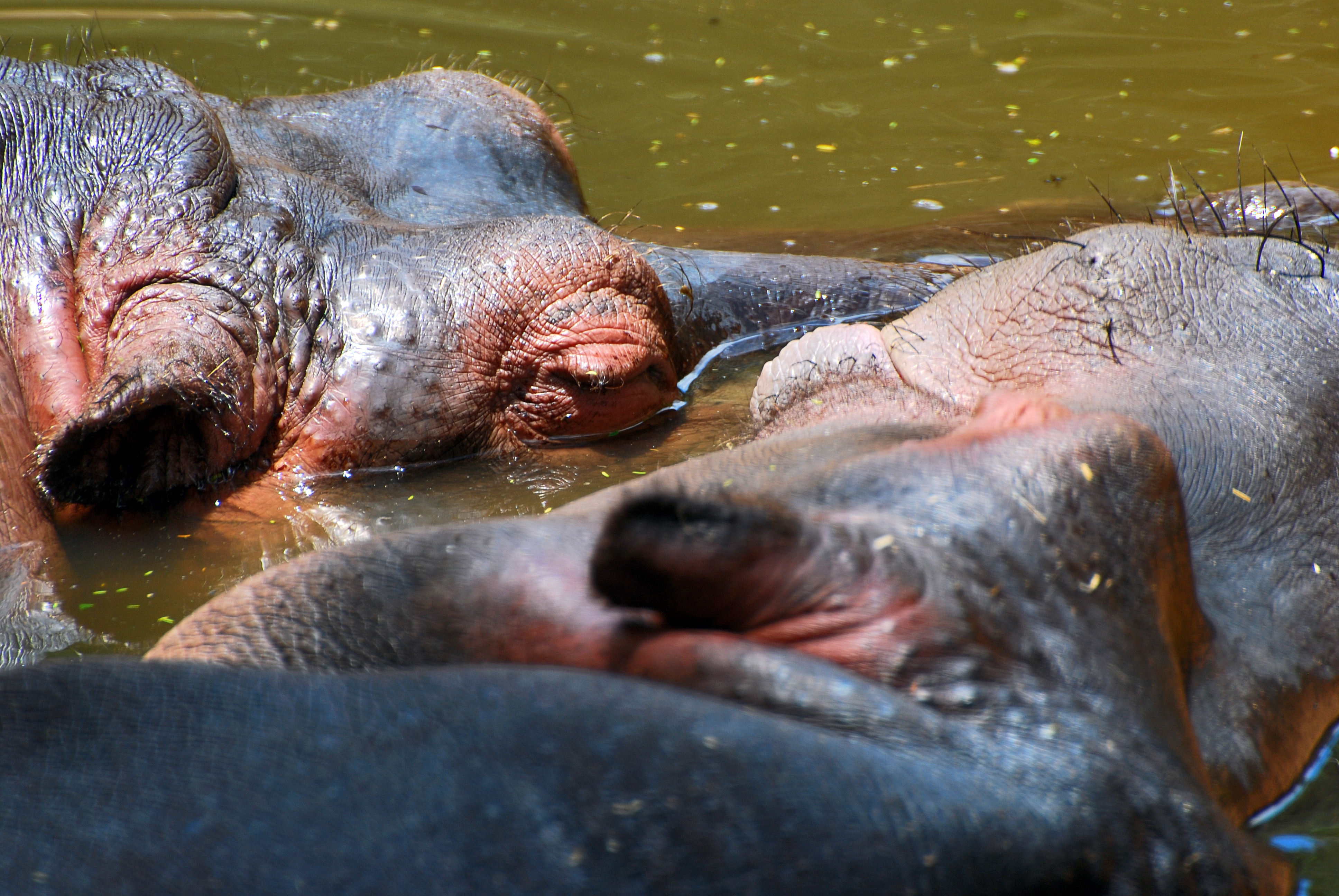 Hippopotamus